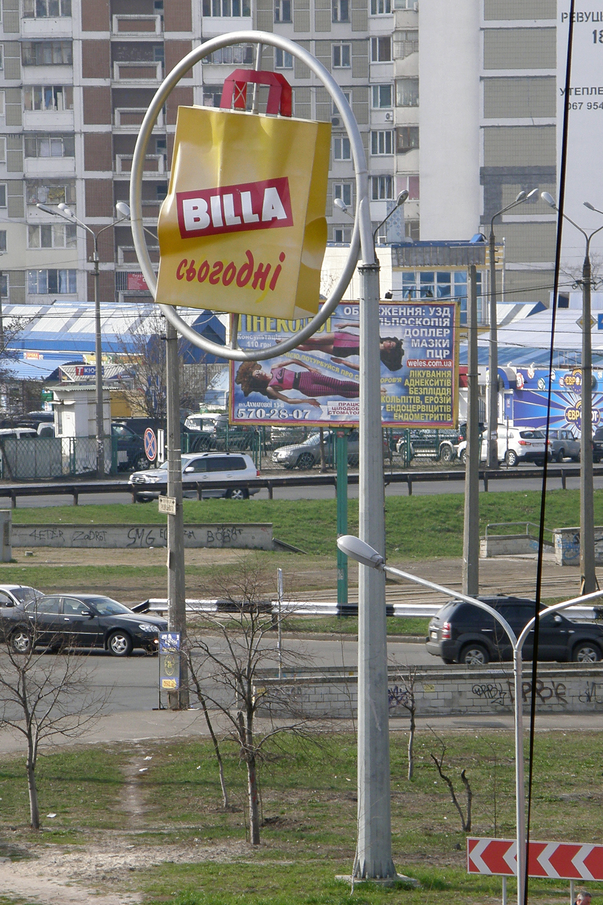 стела супермаркета «Білла» на розі вулиць Ревуцького та Тростянецької, Київ